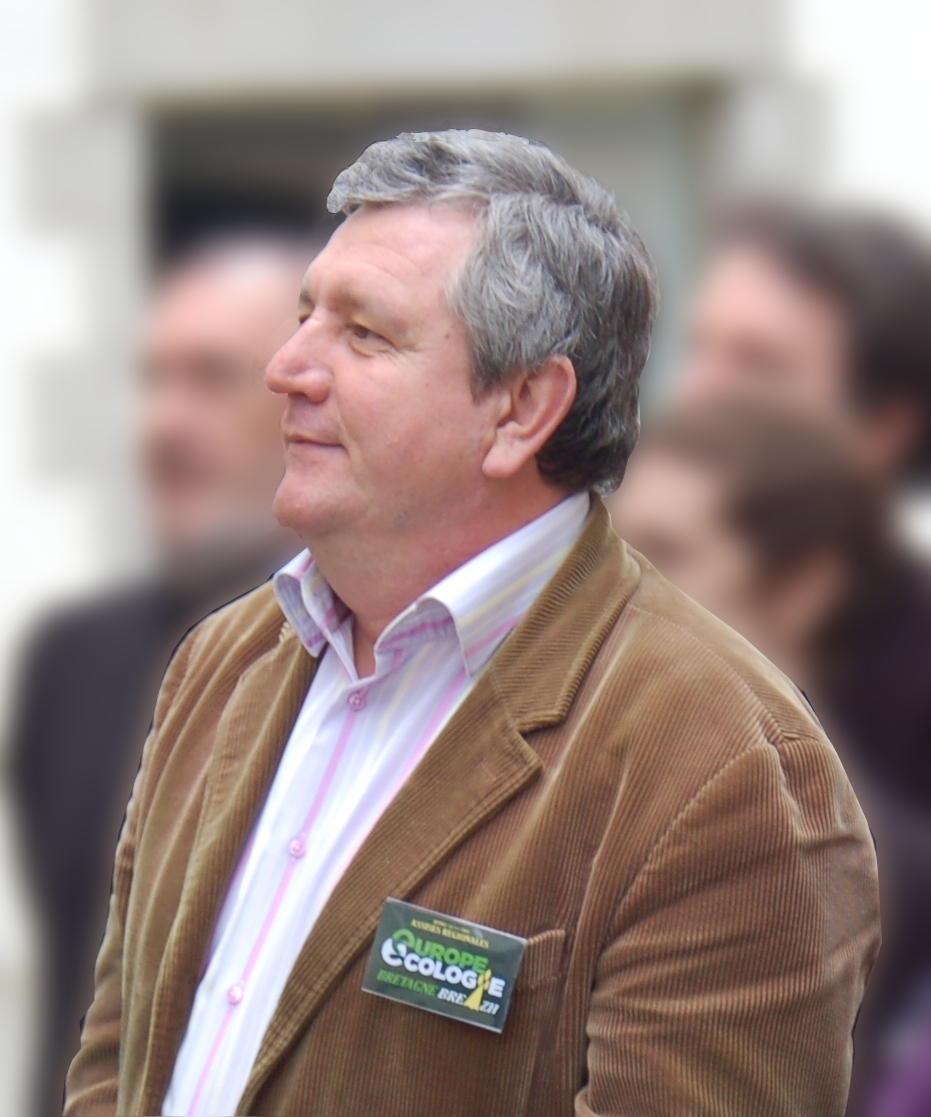 Guy Hascoët, point presse à Quimper : présentation des têtes de listes Europe Écologie Bretagne